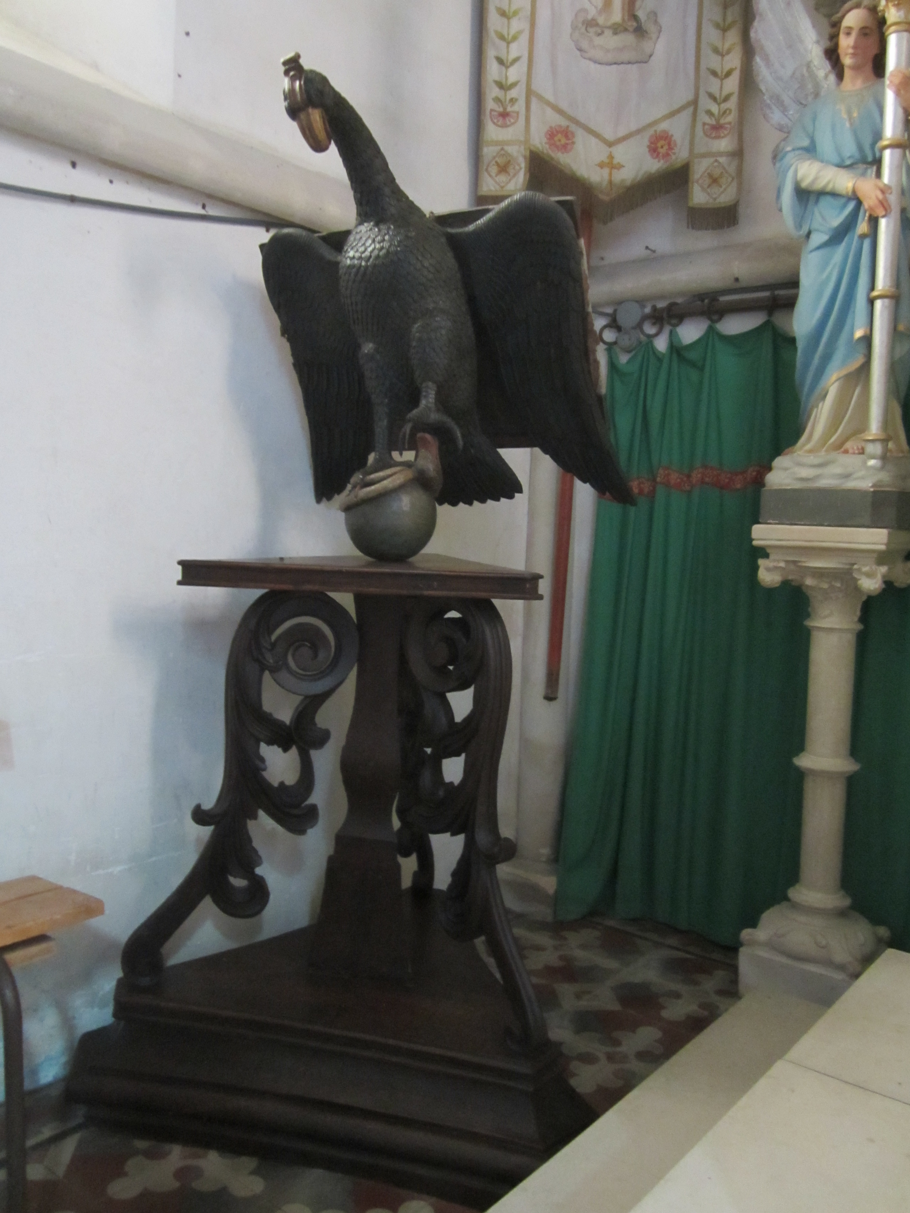 Saint-Martin-de-Varreville, Manche